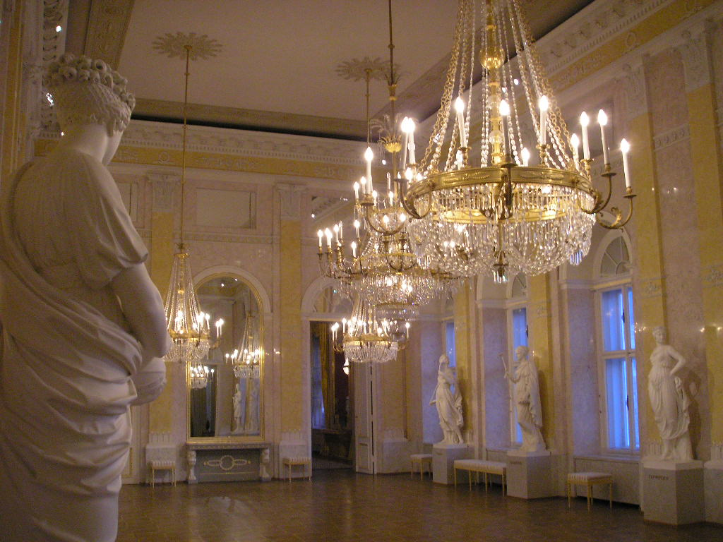 The Albertina, former Palais Erzherzog Albrecht, in Vienna - Hall of Muses.